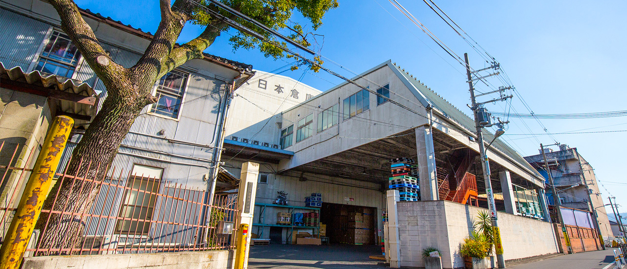 八尾営業書